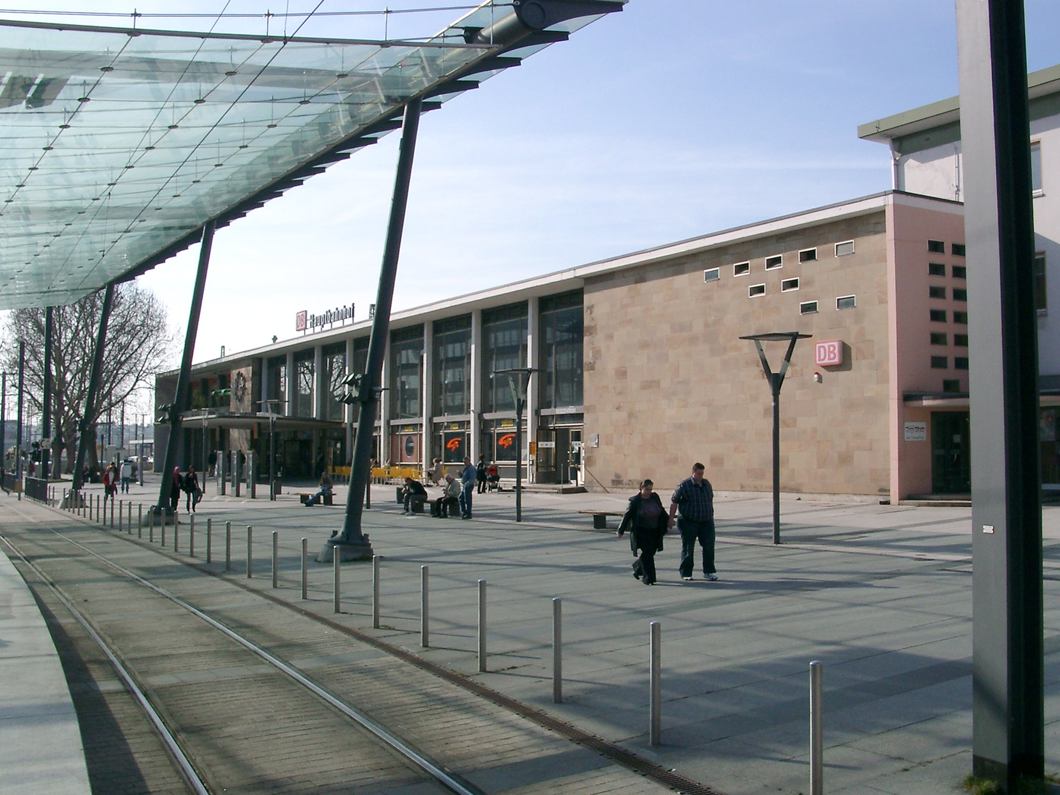 Heilbronn Hauptbahnhof